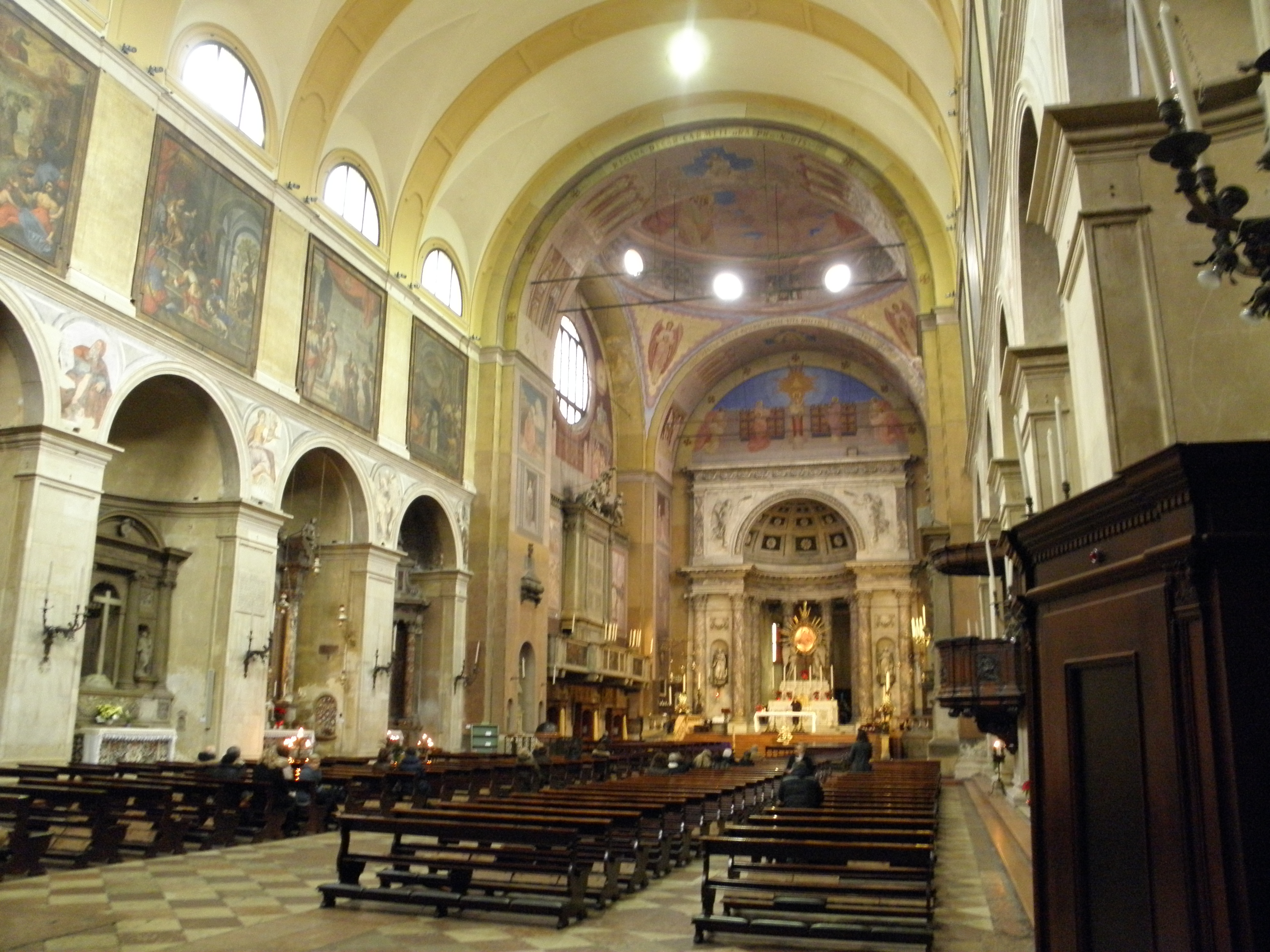 Padova, Basilica del Carmine: interno.